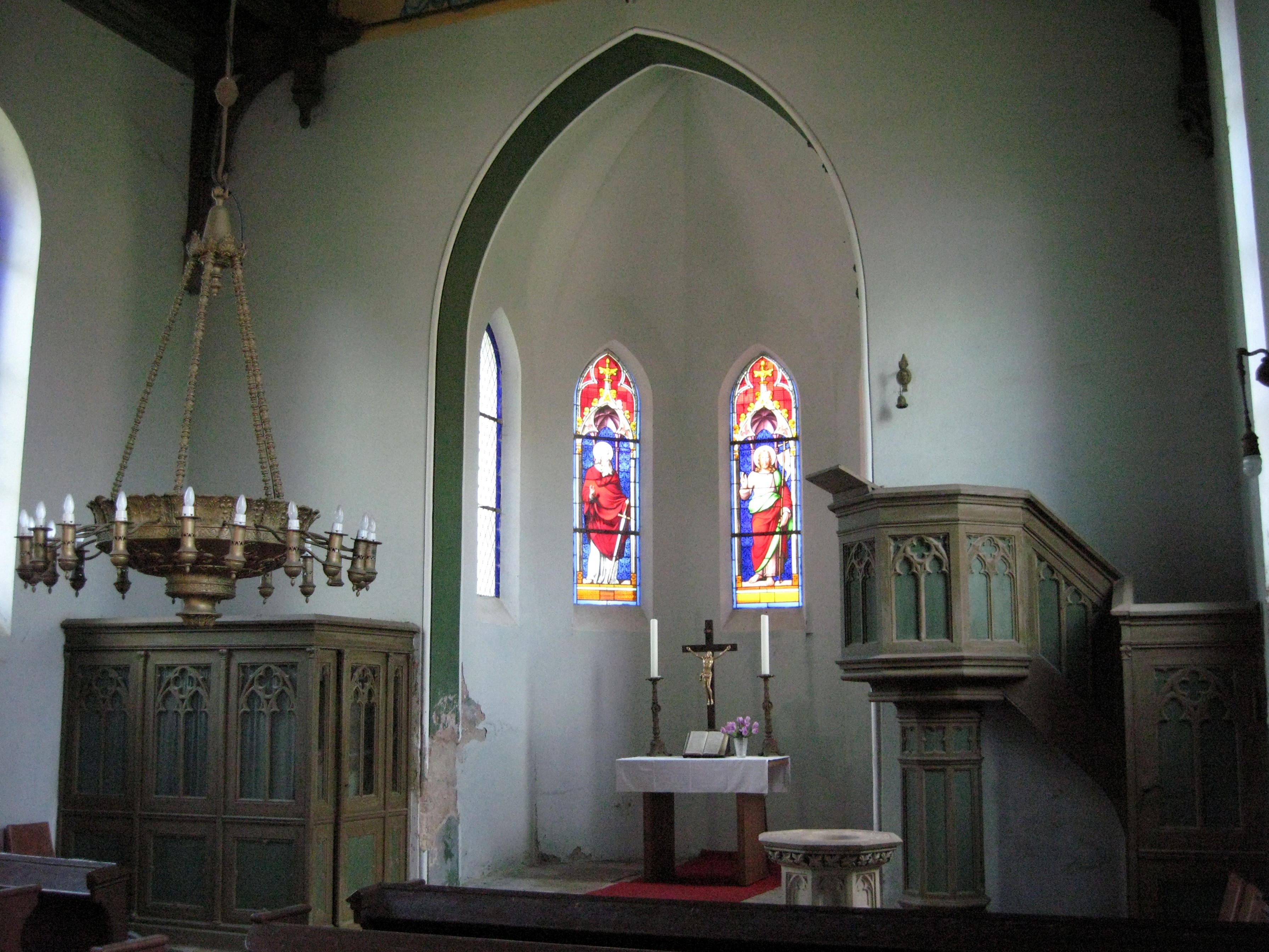 Kirche des Ortes Lanke in der Gemeinde Wandlitz, Landkreis Barnim, Land Brandenburg, Deutschland